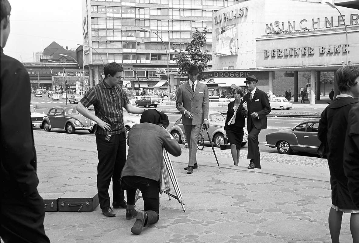 Modeaufnahmen auf dem Breitscheidplatz in Berlin-Charlottenburg.